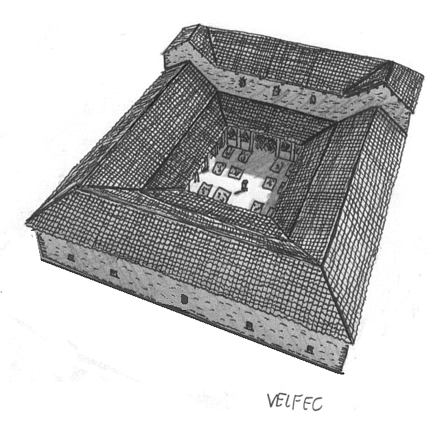 Rekonstruktionsversuch des Lagerhospital von Kastell Housesteads (Vercovicium) am Hadrianswall, Zustand im 2. Jahrhundert n.Chr.